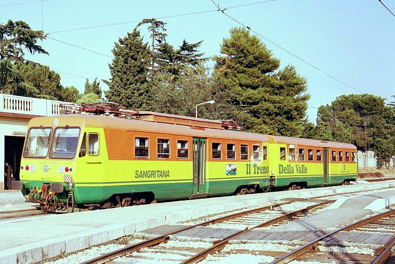 Elettromotrice ALe 02 della Ferrovia Adriatico Sangritana, con cassa ricostruita, in sosta alla stazione di Lanciano, pronta ad effettuare il "Treno della Valle"